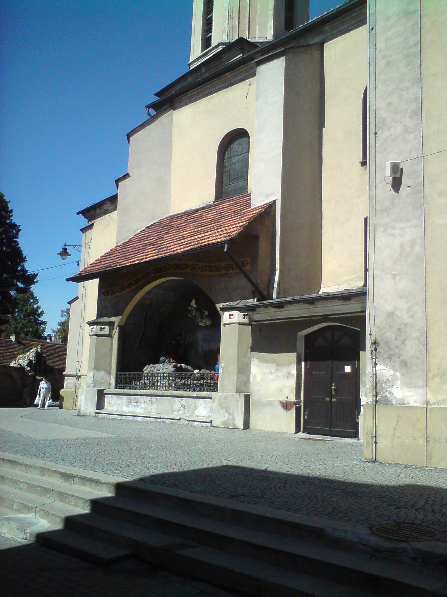 Kościół parafialny pw. św. Mikołaja - widok od ul. Koscielnej, Pyskowice, ul. Poniatowskiego 10 (zabytek nr A/289/60 z 7.03.60)